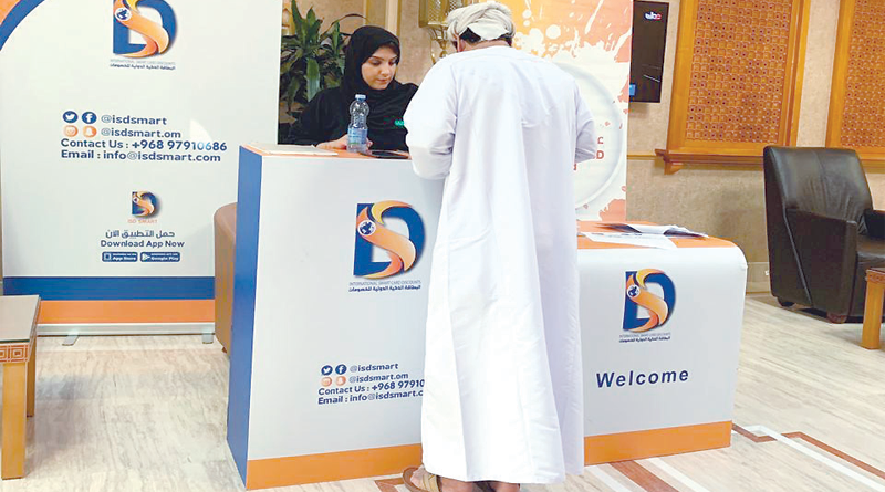 صورة من إستضافة البطاقة الذكية الدولية للخصومات في جريدة عمان